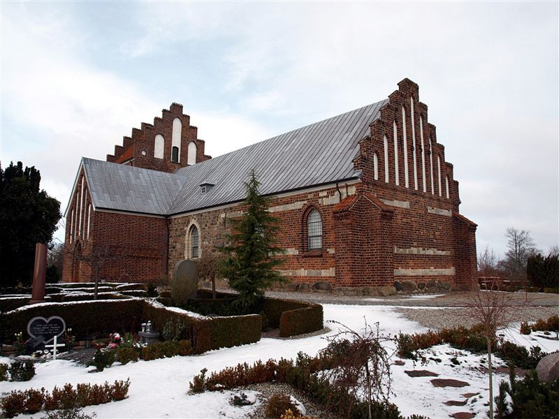 Smørum Kirke i Danmark. Smørum kirke